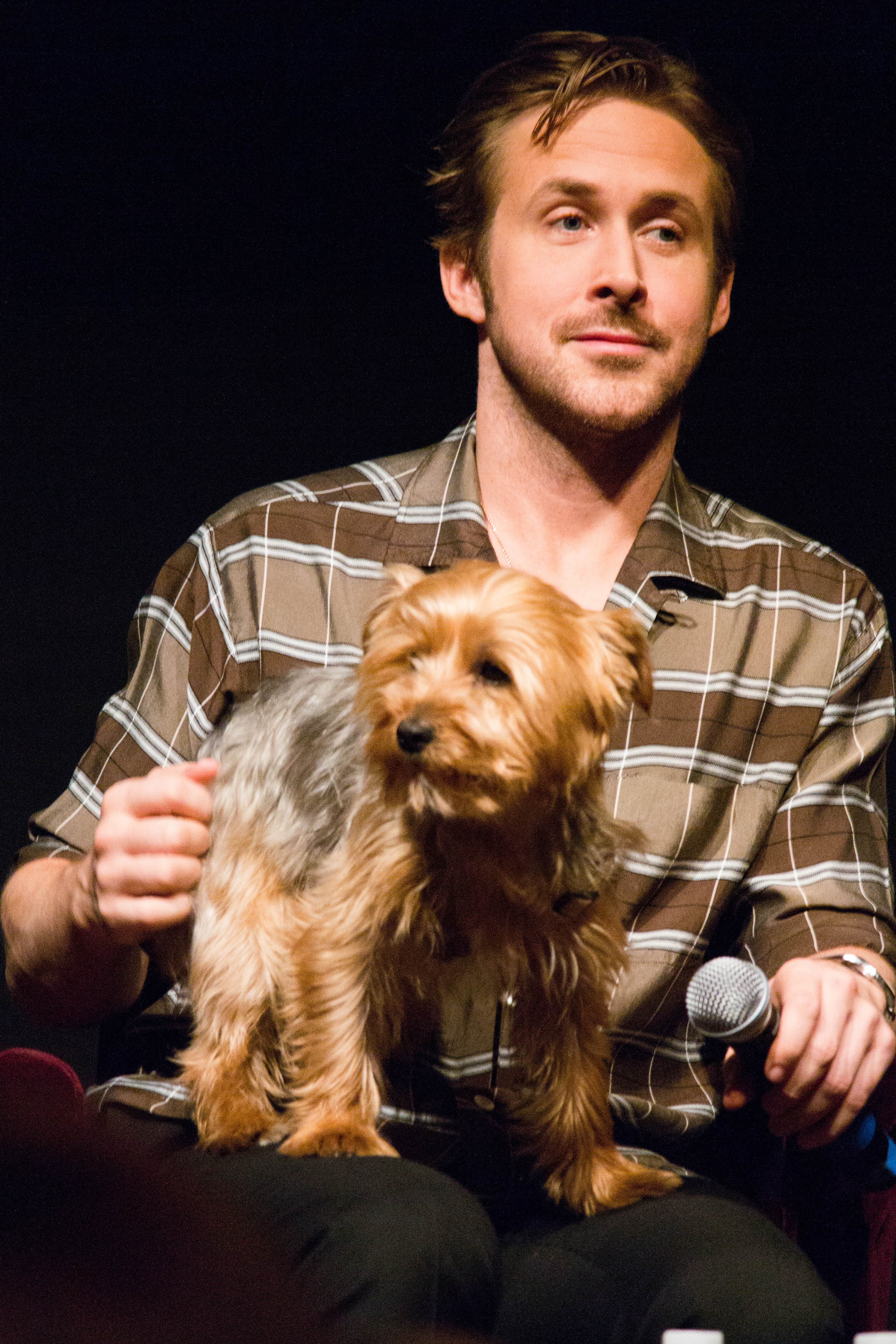 Rencontre avec Ryan Gosling et Reda Kateb pour Lost River